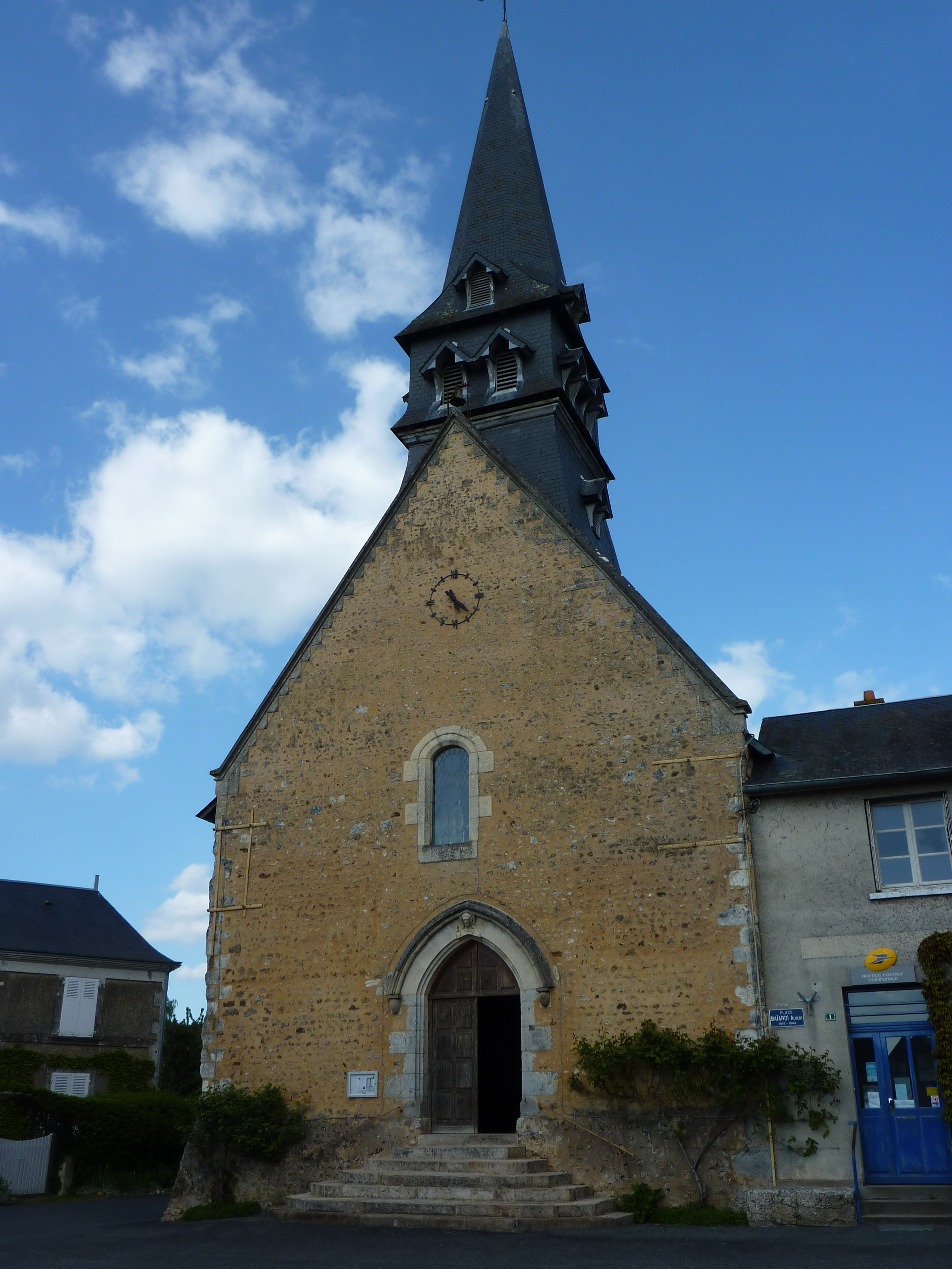 Jupilles dans la Sarthe